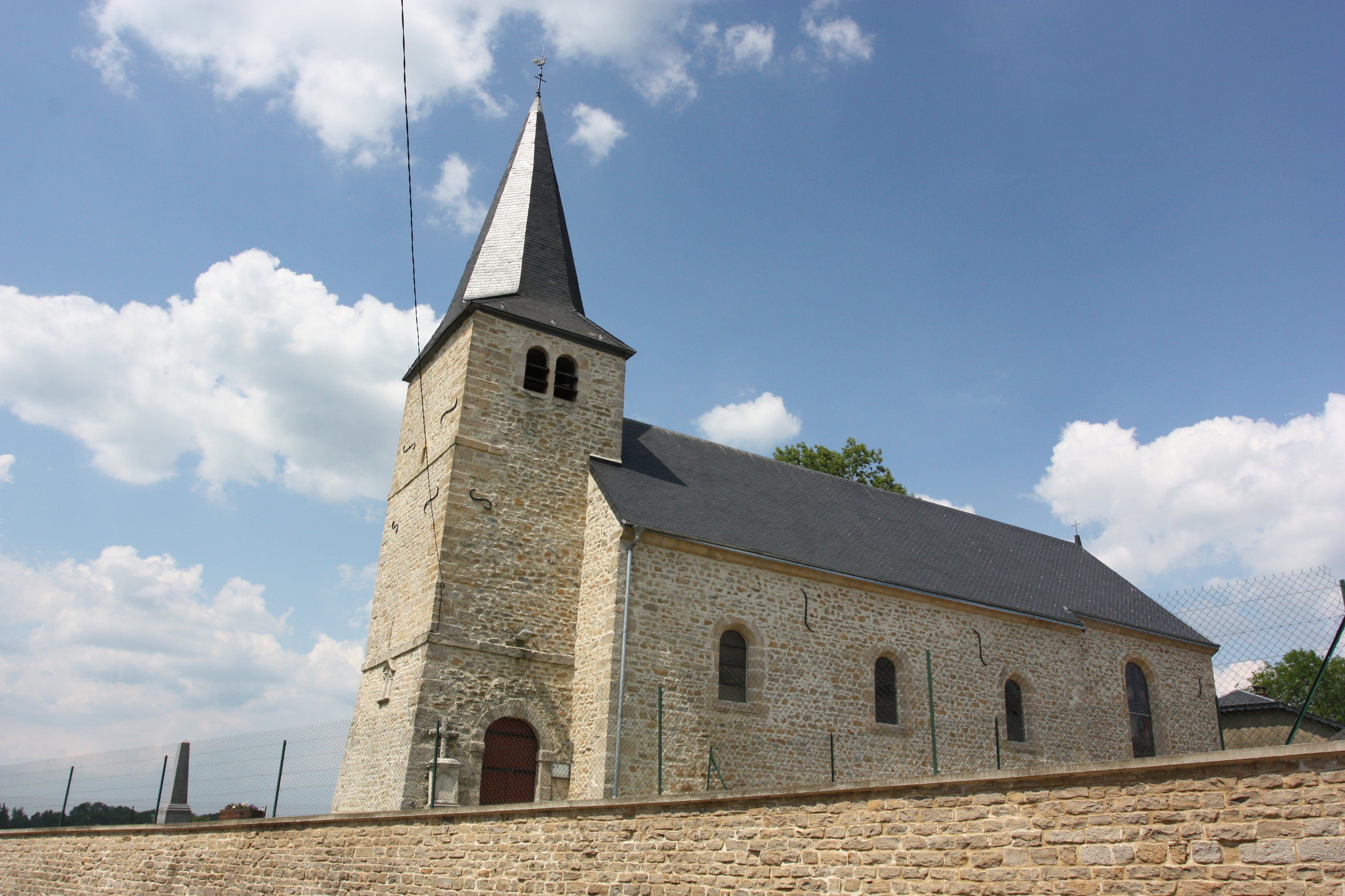 Mogues l’Église Saint Denis